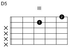 Eigenanfertigung